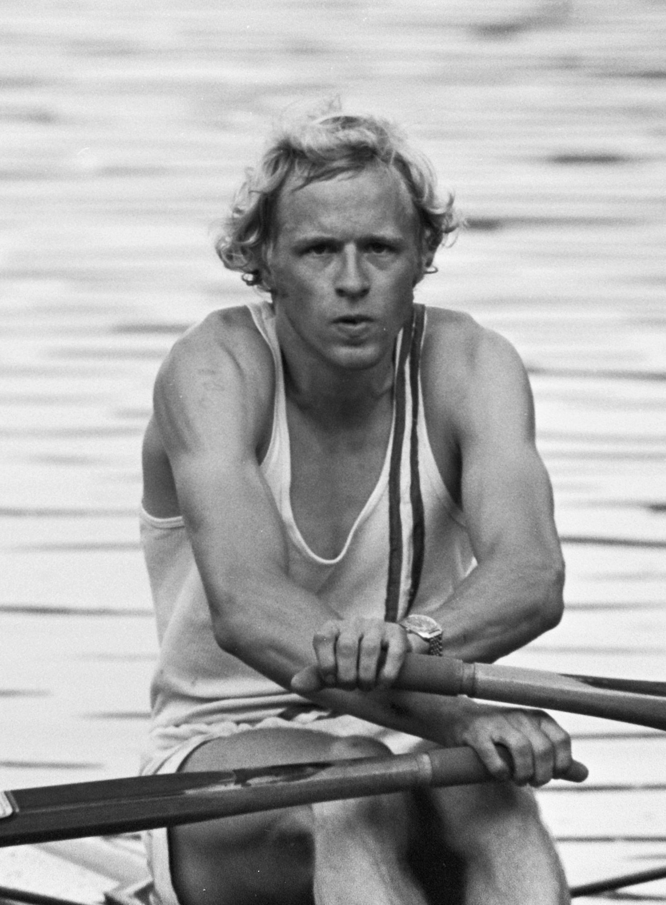 Nationale roeikampioenschappen 1975 op de Bosbaan, eerste dag. Skiffeur Harold Punt